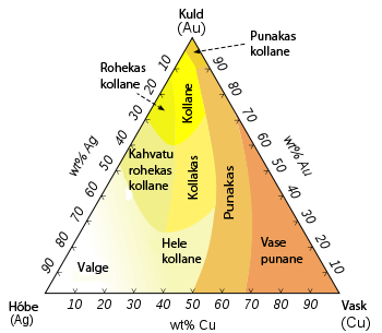 Kulla faasidiagramm